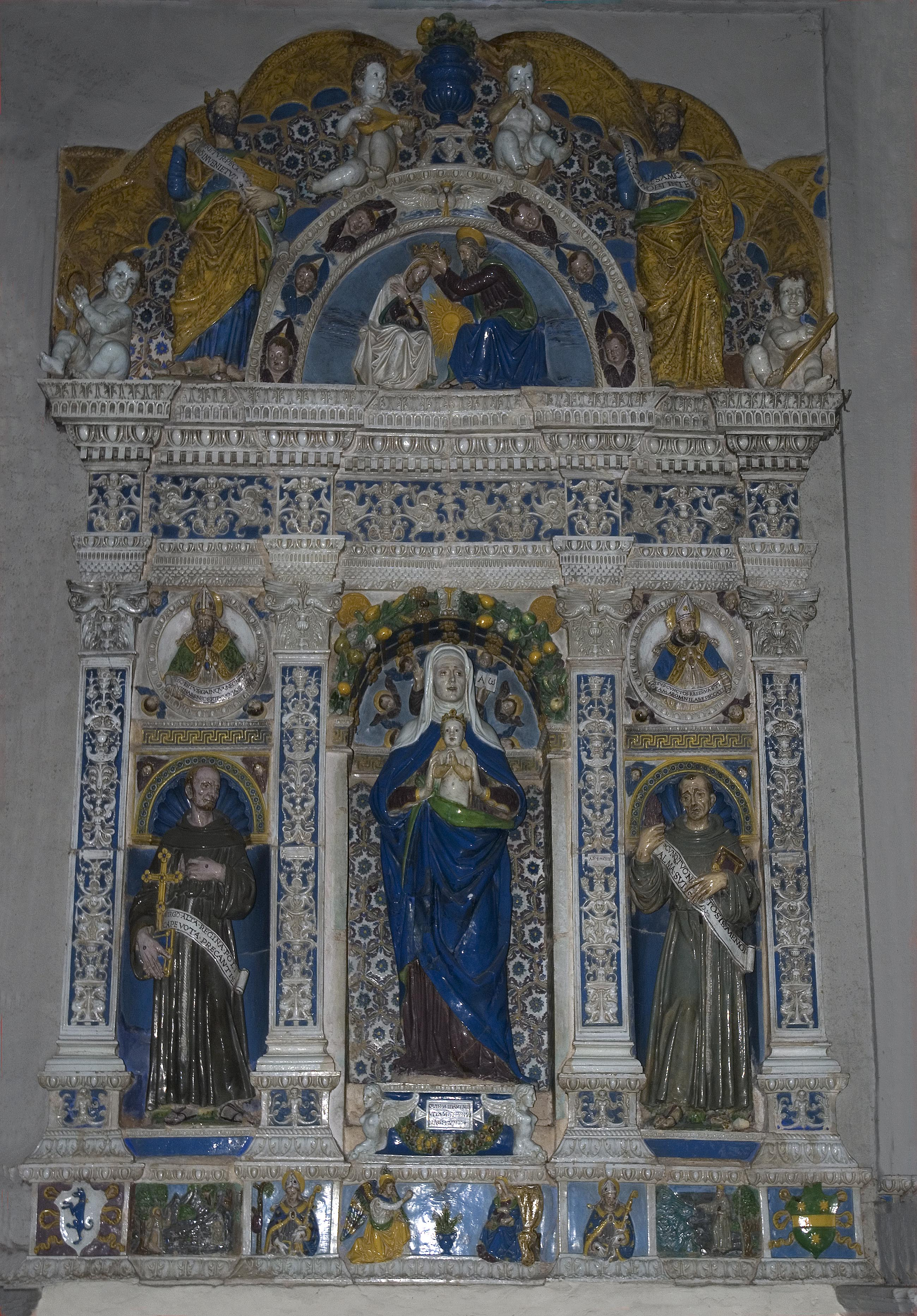 Altare posto nella chiesa di San lucchese a Poggibonsi